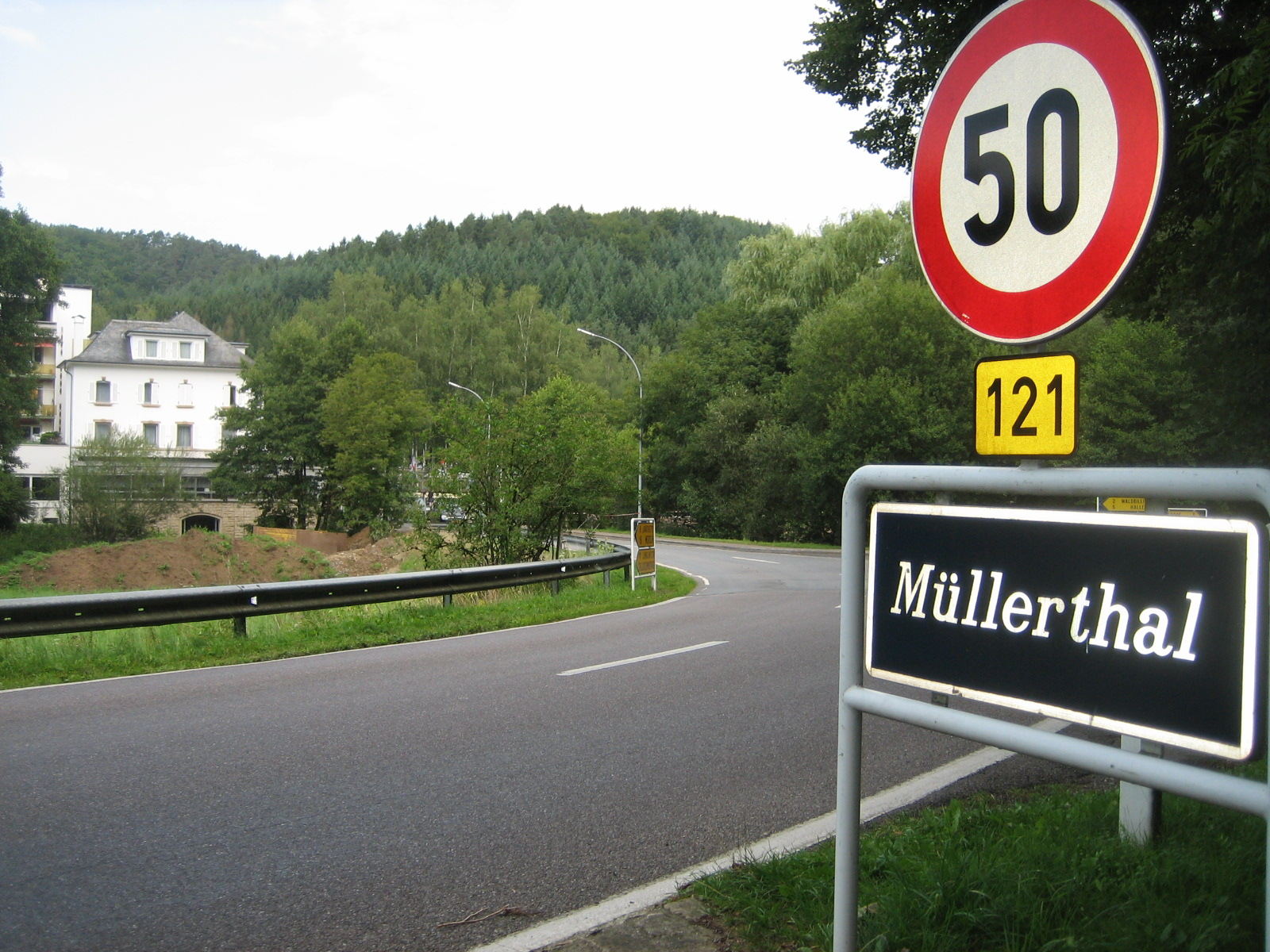 Lieu-dit Mëllerdall ("Müllerthal") an der Klenger Lëtzebuerger Schwäiz